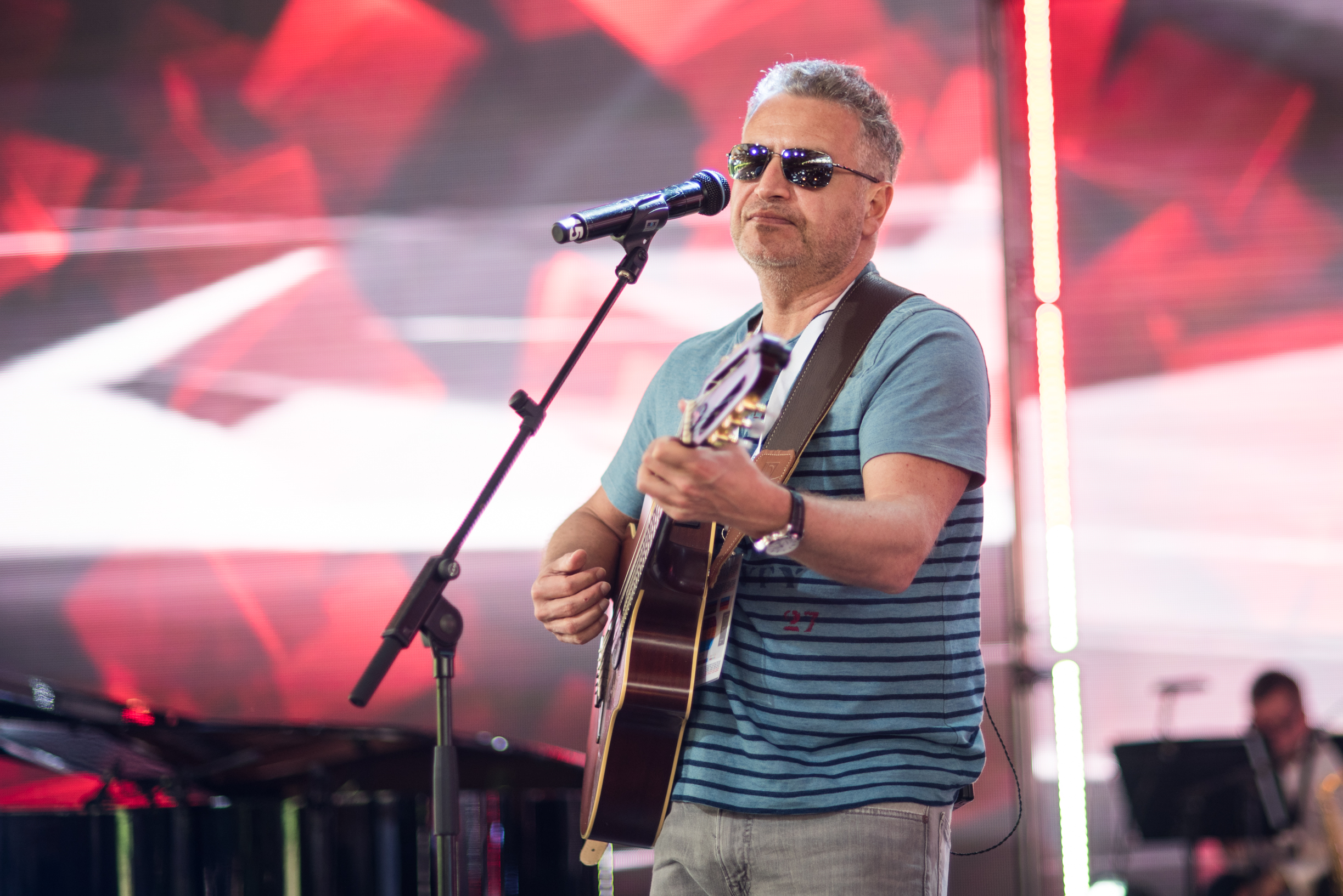 Леонид Агутин на репетиции фестиваля «Лайма. Рандеву. Юрмала 2017»